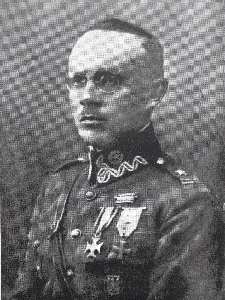 Jan Załuska – w roku 1920 mjr, d-ca baonu w Wielkopolskiej Szkole Podchorążych Piechoty. Kawaler Orderu Virtuti Militari V klasy. † 1940 Katyń